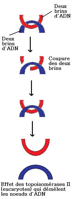 Schéma montrant l'éffet des topoisomérases I (un seul brin rompu de façon aléatoire) (eucaryotes)